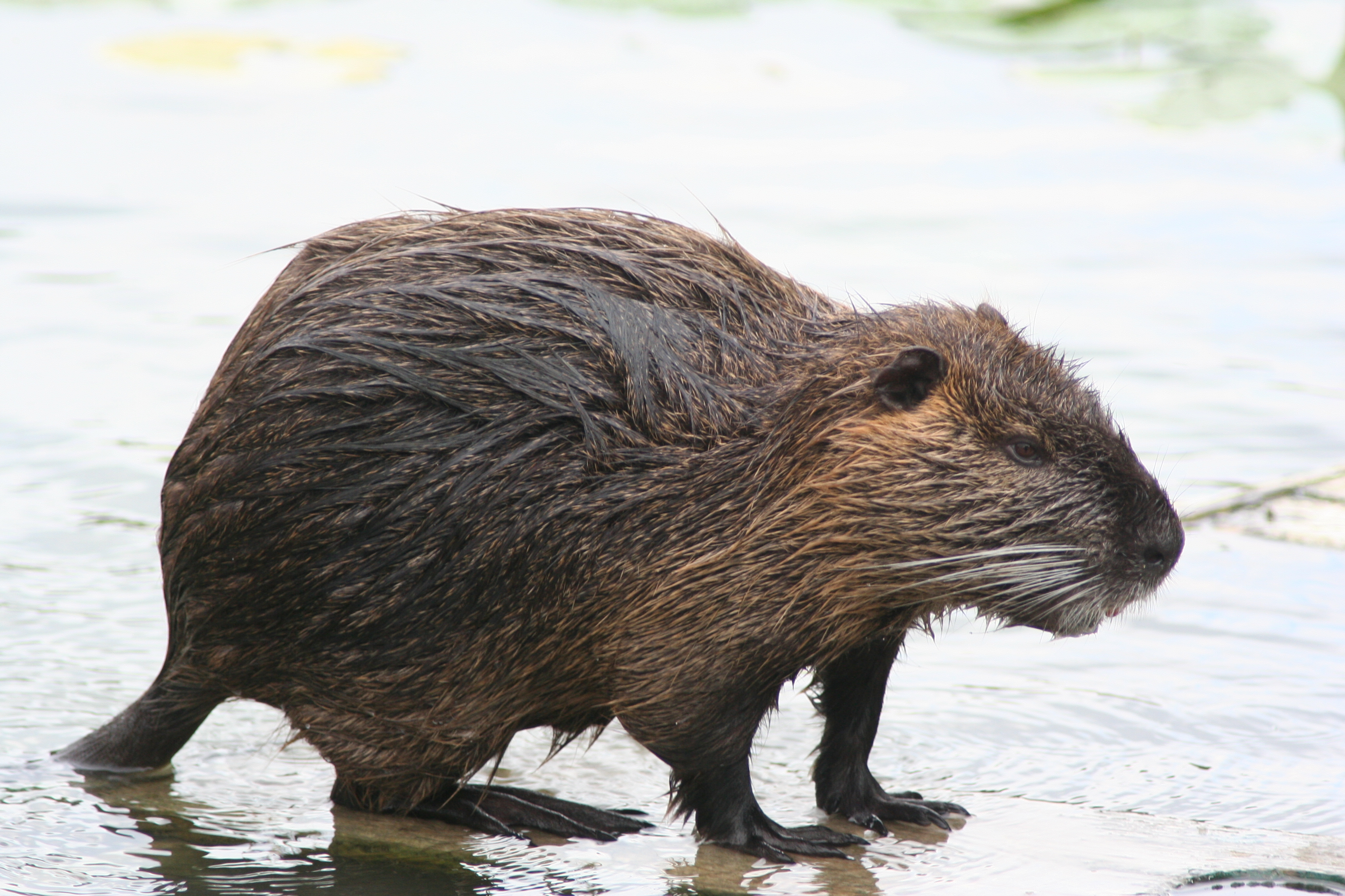 Myocastor coypus (ragondin) sur la marne, dans le val de marne à proximité de Paris